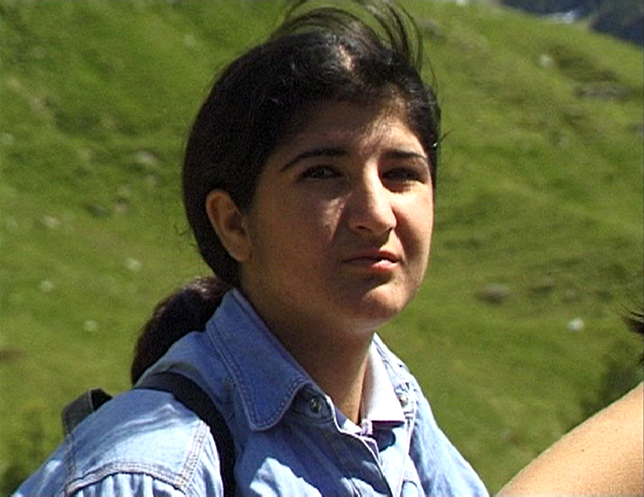 L’élève Gulnaz d’origine turque. Image tirée du film « Classe d’accueil » de Fernand Melgar.